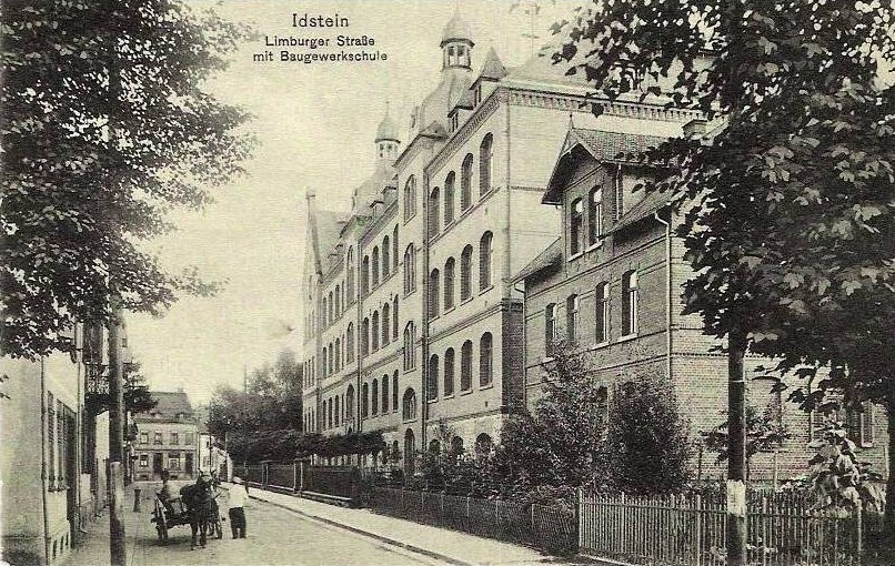 Idstein, Limburger Straße 2, Königliche Baugewerkschule